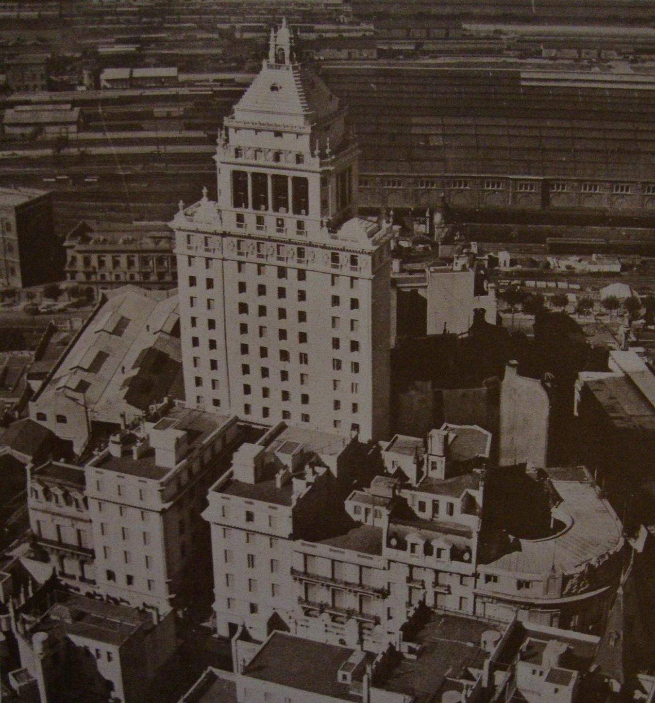 Vista aérea del Edificio Mihanovich (también conocido como Bencich) en la calle Arroyo 845, del barrio de Retiro, en Buenos Aires, Argentina. Diseñado por el estudio de Calvo, Jacobs y Giménez, hoy es el hotel Sofitel Buenos Aires.